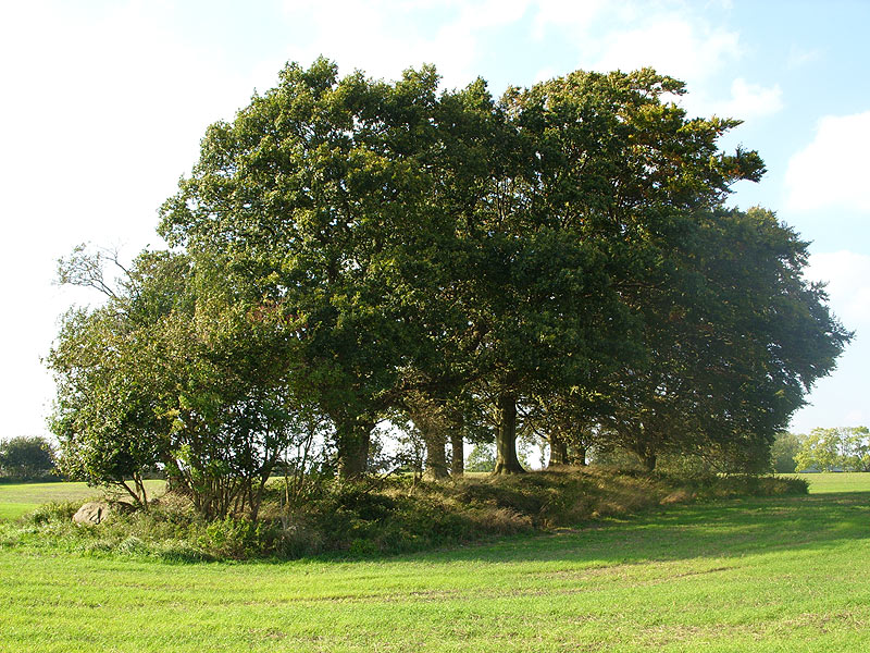 Langbetten von Rothensande